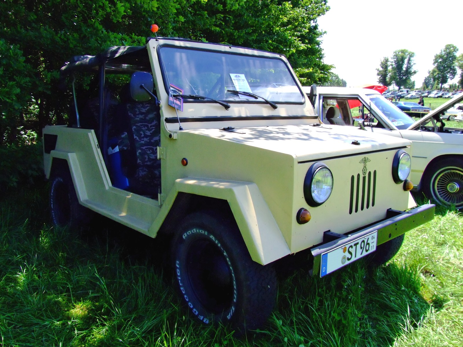 Quelle: selbst fotografiert, 06/2007 Fotograf: Späth Chr.